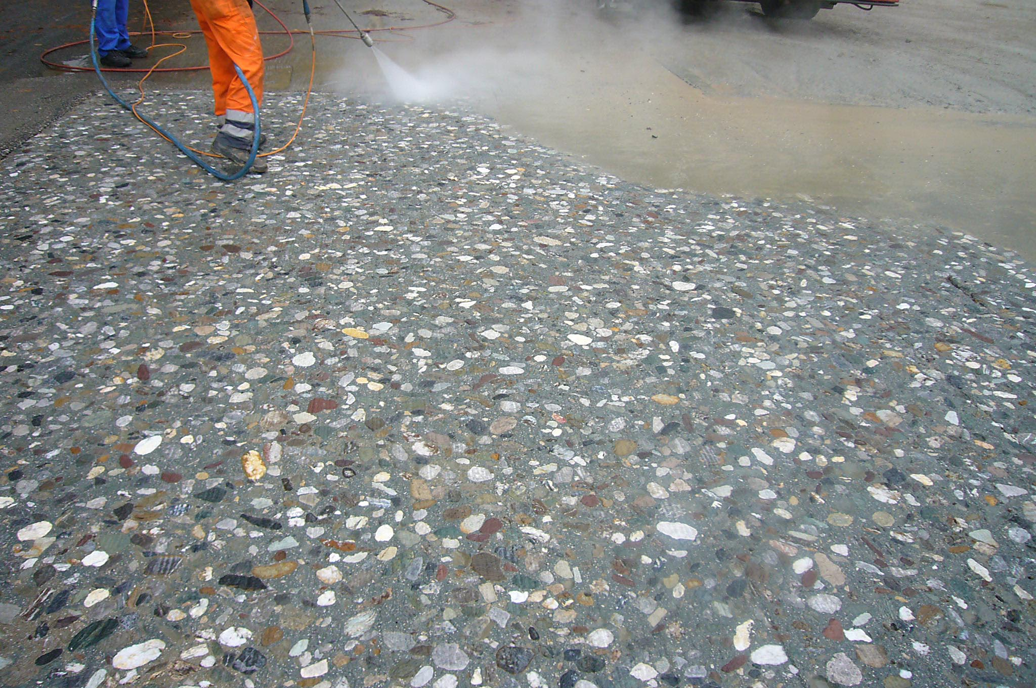 maxRieder work.